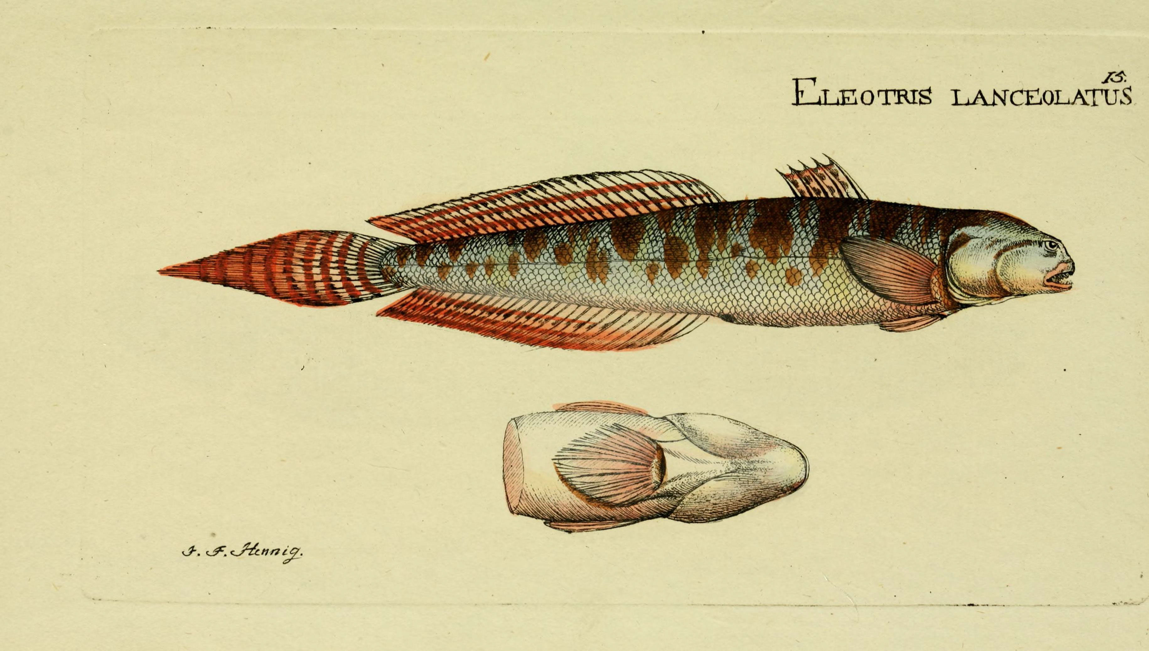 Pseudapocryptes elongatus syn. Eleotris lanceolata